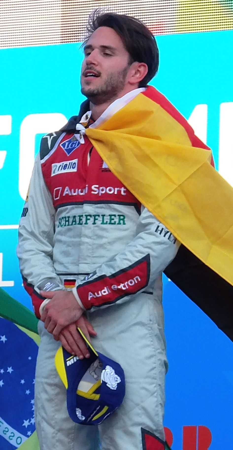 Podium zum Berlin E-Prix 2018: Dieter Gass, Lucas di Grassi, Daniel Abt und Jean-Éric Vergne (v.l.n.r.)